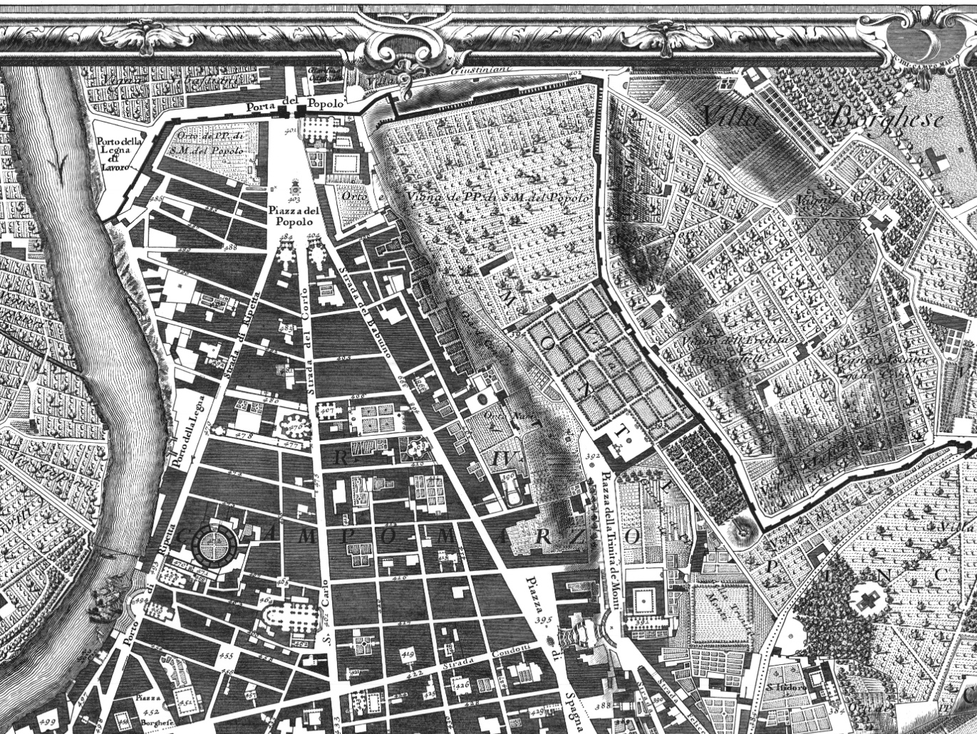 Roma, il Campo Marzio nord - Tridente e colle Pincio - nel 1748, dalla Nuova Topografia di Roma di Giovanni Battista Nolli